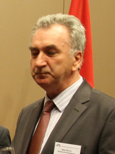 Mirko Šarović